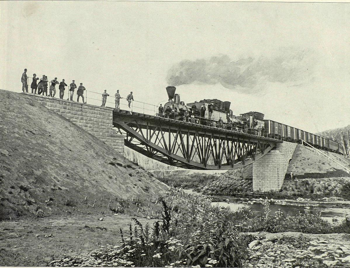 Железный мост через реку Ушайку. Река Ушайка протекает с востока на запад по таёжной местности, покрытой лиственным лесом; течение реки тихое, русло её во многих местах заросло камышами; летом река сильно мелеет и нередко можно перейти с одного её берега на другой не замочивши ног. Весной же, во время разливов, Ушайка выступает из своих отлогих берегов и далеко заливает окрестные сёла, деревни и поля. В Томск Ушайка вливается узенькой полоской и, разделивши город на две части, впадает в Томь около базарного моста. Линия Томской ветви пересекает Ушайку на 76 версте железным мостом отв. 20 с. с ездою по верху. Пролётные части моста состоят из 2 ферм треугольной системы с верхними прямолинейными и нижними параболическими поясами; каждая ферма удалена одна от другой на 8 футов; фермы соединены между собой вертикальными связями в плоскости стоек и в плоскостях обоих поясов - горизонтальными. Проезжая часть состоит из деревянных поперечин, рельсов, охранных брусьев, настила и перил.